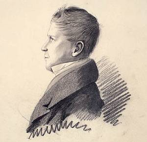 Joseph Légaré, fils.